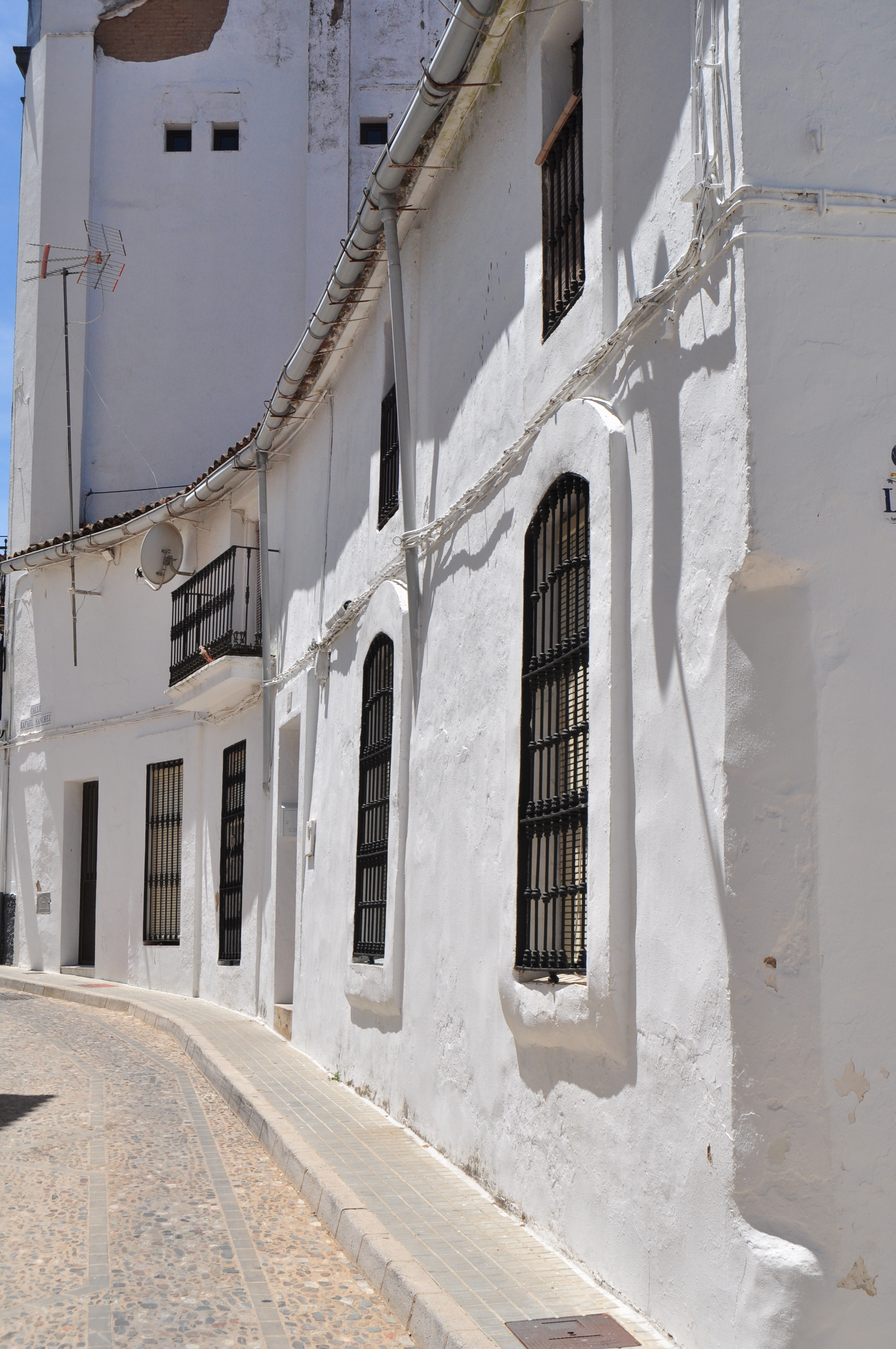 Jabugo - 007